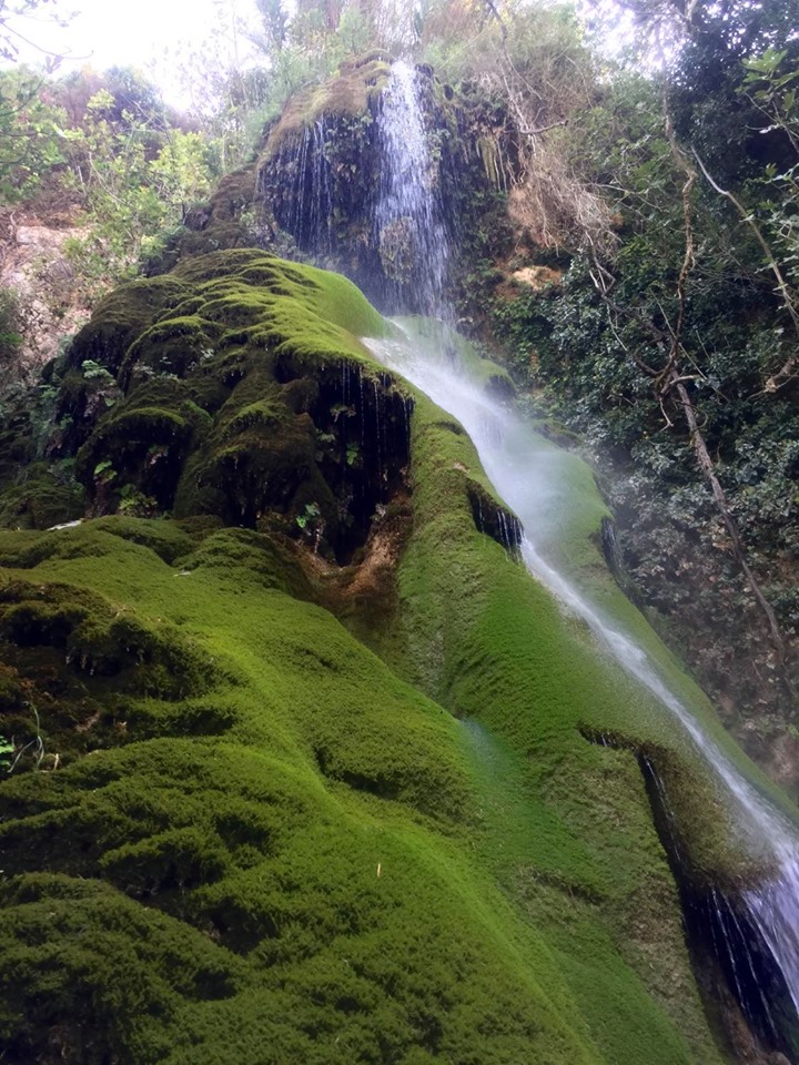 Κρεμμιώτης Καταρράκτης